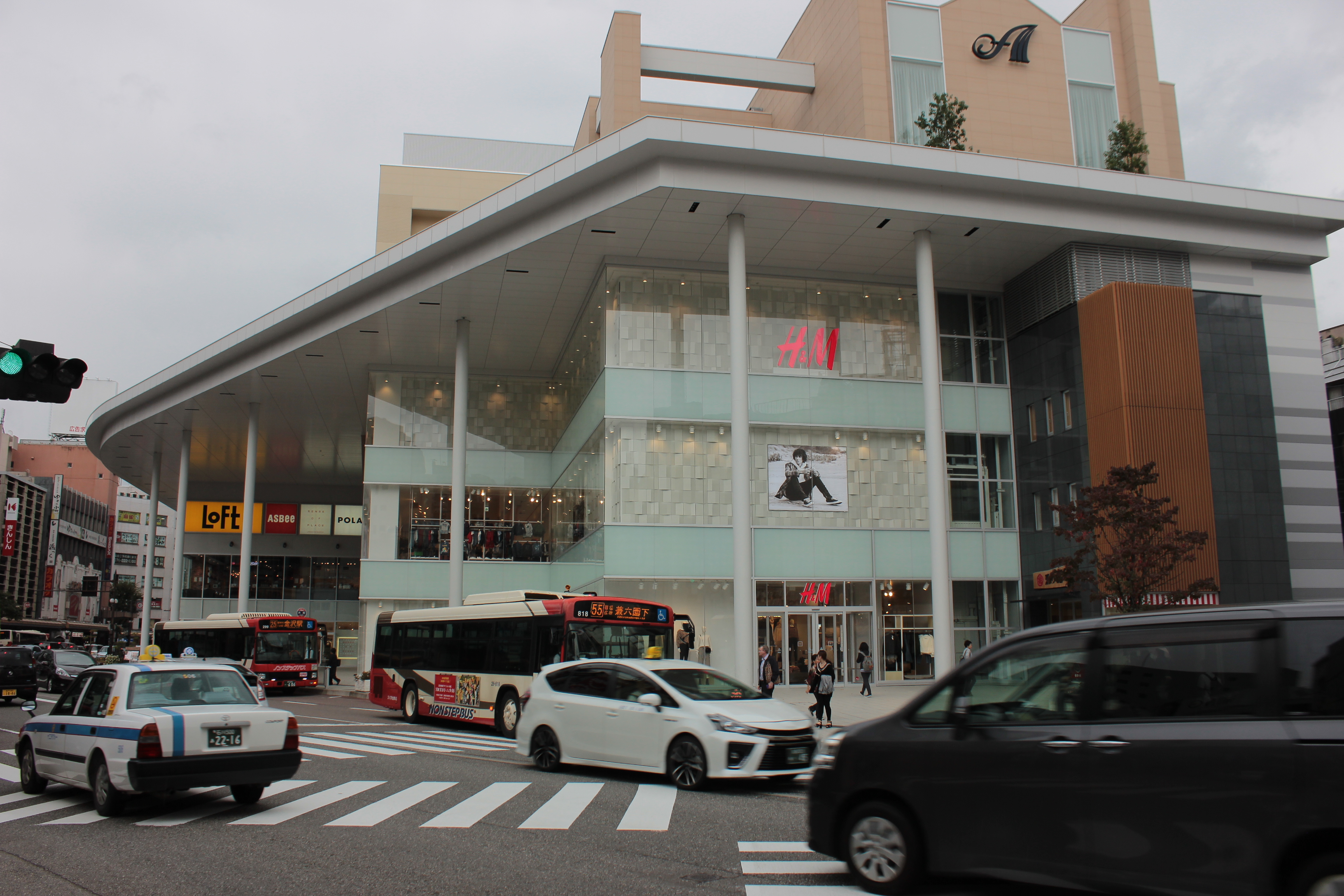 片町きらら（石川県金沢市片町） Canon EOS Kiss X5